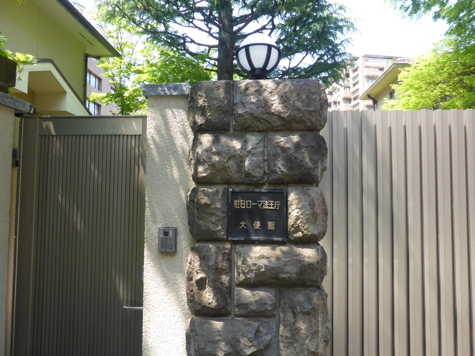 駐日ローマ法王庁。つまり駐日バチカン市国大使館。